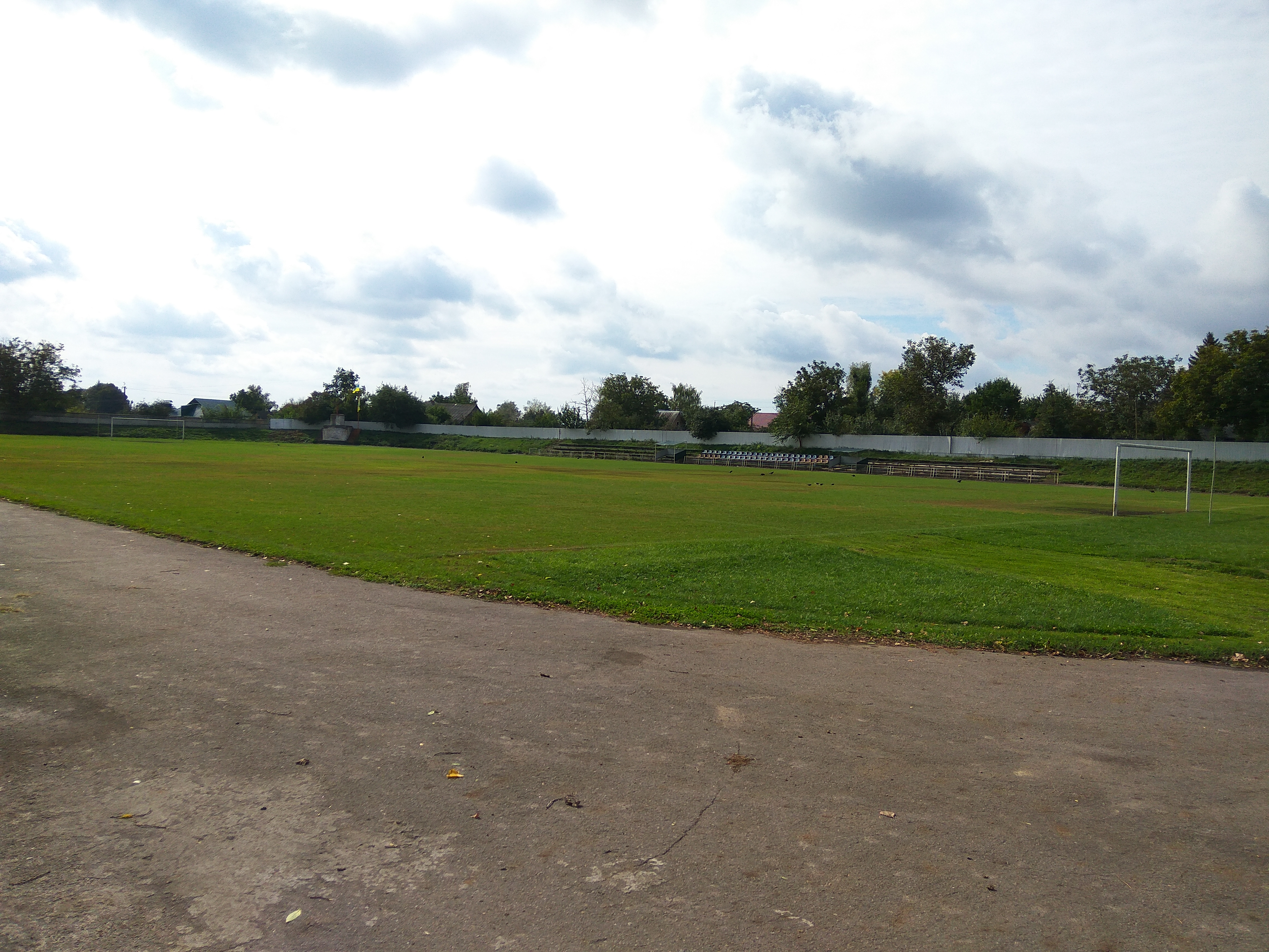 Стадіон у Липовці